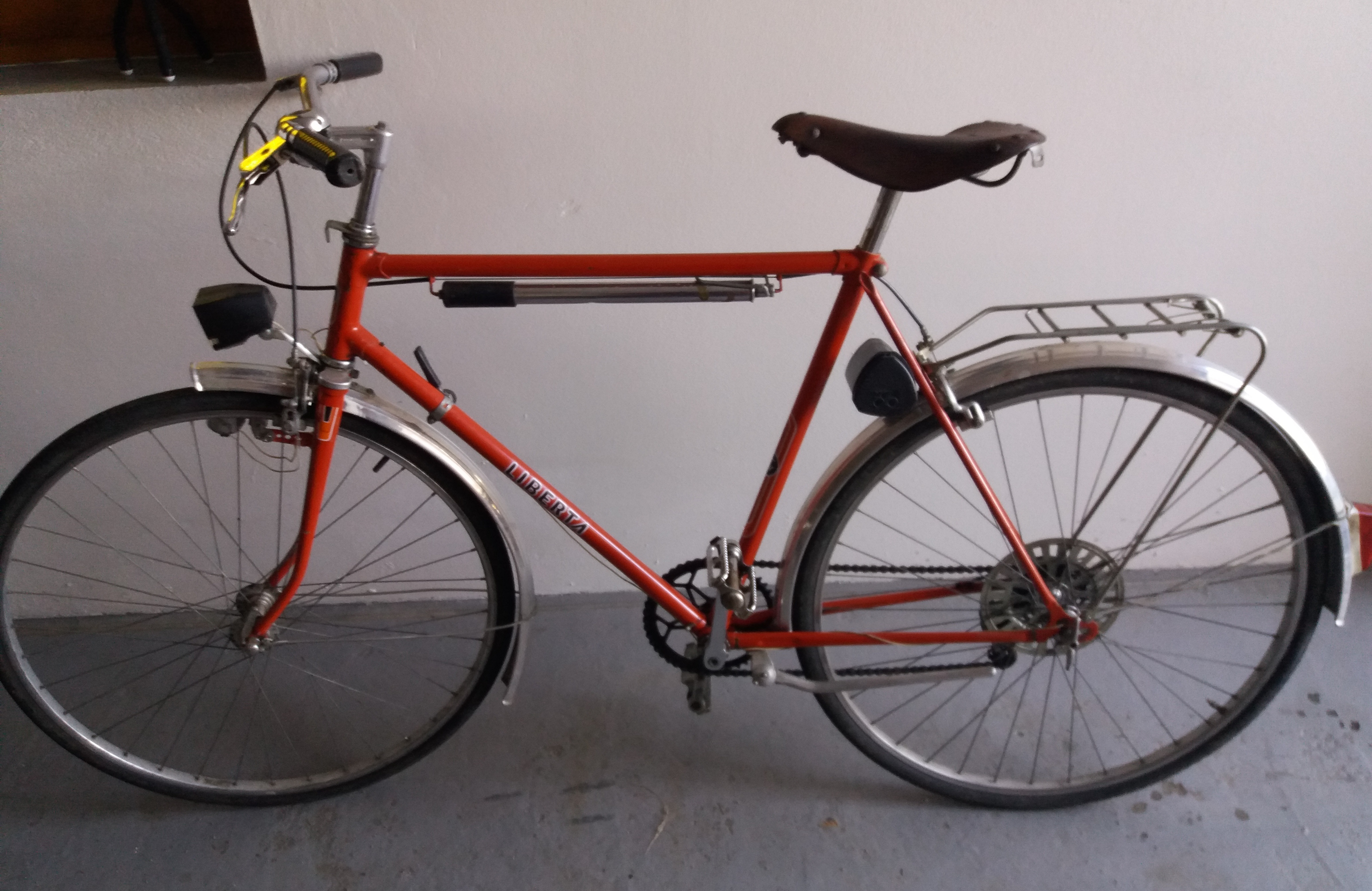 Pánské cestovní kolo Liberta 28", rok výroby 1990